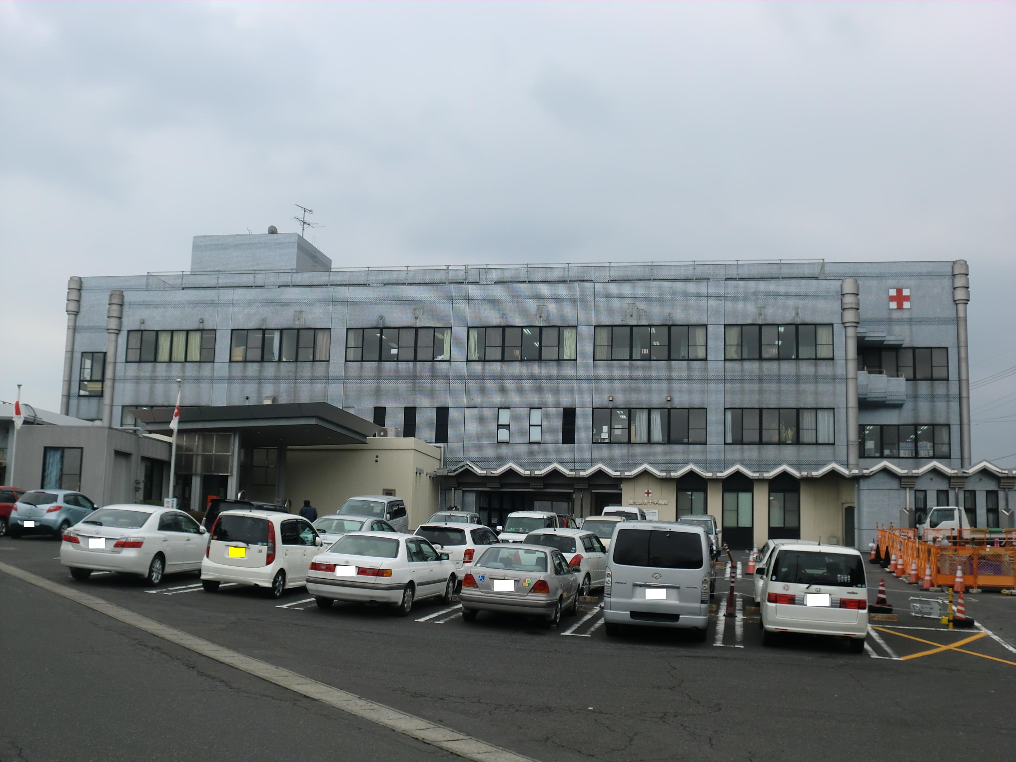 鹿児島市にある鹿児島赤十字病院